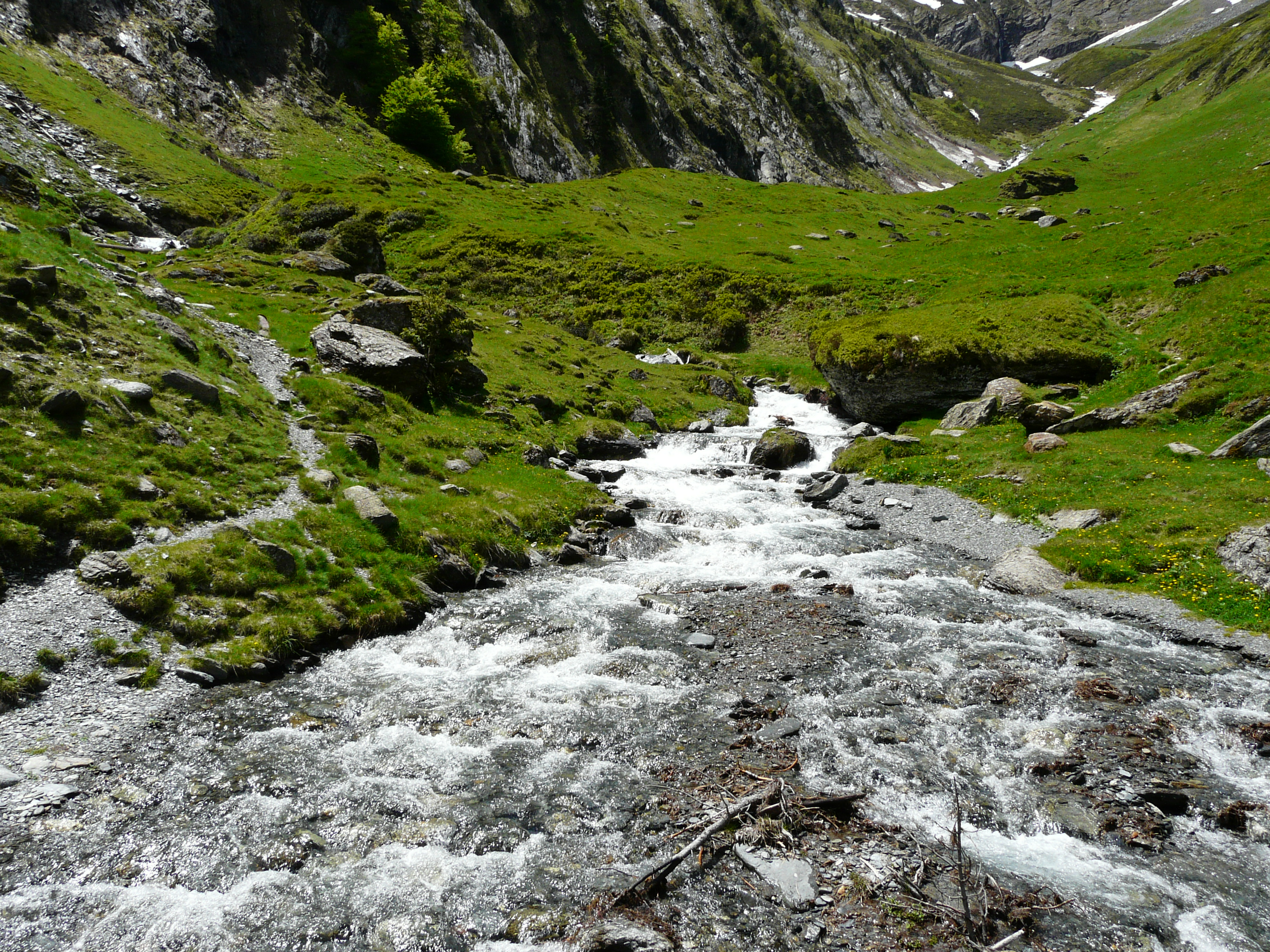 La Pique à quelques centaines de mètres de sa source, Hospice de France, Bagnères-de-Luchon, Haute-Garonne, France.